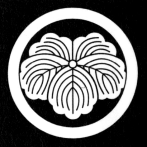 丸に蔦 蔦紋は、日本十大紋の一つに数えられるほどに。蔦は蔓科の植物で、他の樹木や建物につたわってどんどんはびこることから、生命力の強い縁起のよい植物として家紋に採用されたようだ。一説に蔦紋の発祥は、桐紋を用いることをはばかって、桐紋の花の部分を取り去り、それに替えて葉を二枚加えたことが始まりだとするものもある。蔦は、紅葉すると楓に似ているので、別名をツタカエデあるいは地錦などともよばれる。 これほどに愛された蔦紋だけに、そのバリエーションも多く、約五百種を数えている。そのなかで一番ポピュラーなものが、五葉の蔦紋だが、葉に切り込みの多いものを特に「鬼蔦」とよんでいる。